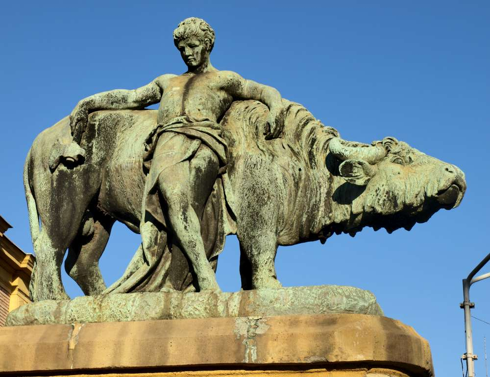 Budapesti Vágóhíd baloldali szobra. Budapest, IX.ker., Soroksári út (Vágóhíd u. és Könyves Kálmán krt. között). Az eredetileg kőből készült alkotásokat (Reinhold Begas, 1874) Sződy Szilárd javításai után bronzból öntötték újjá 1937-ben